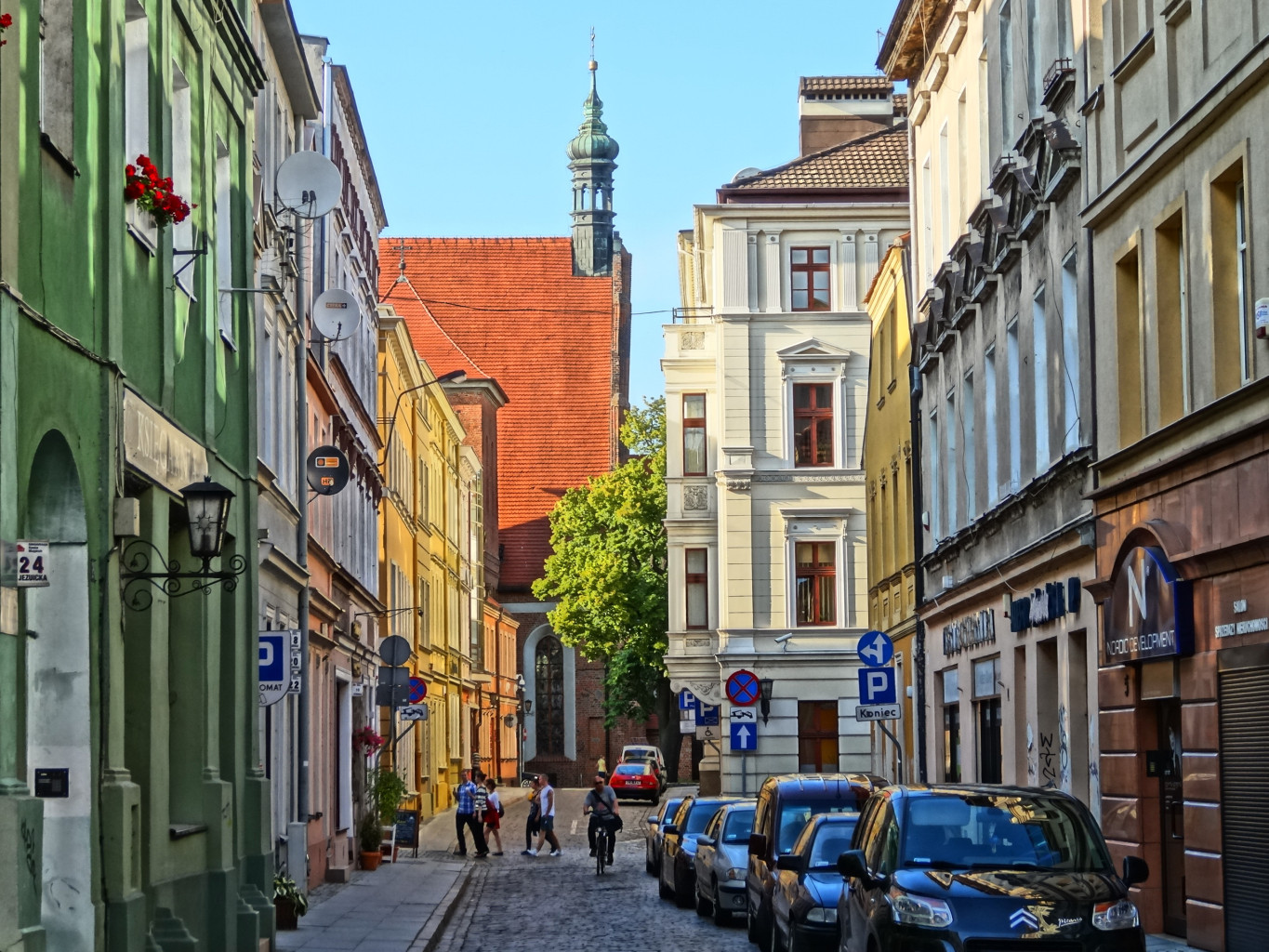 Ulica Jezuicka w Bydgoszczy - widok na północ w kierunku katedry